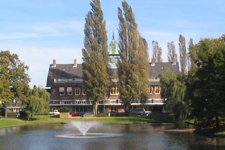 Agnetapark